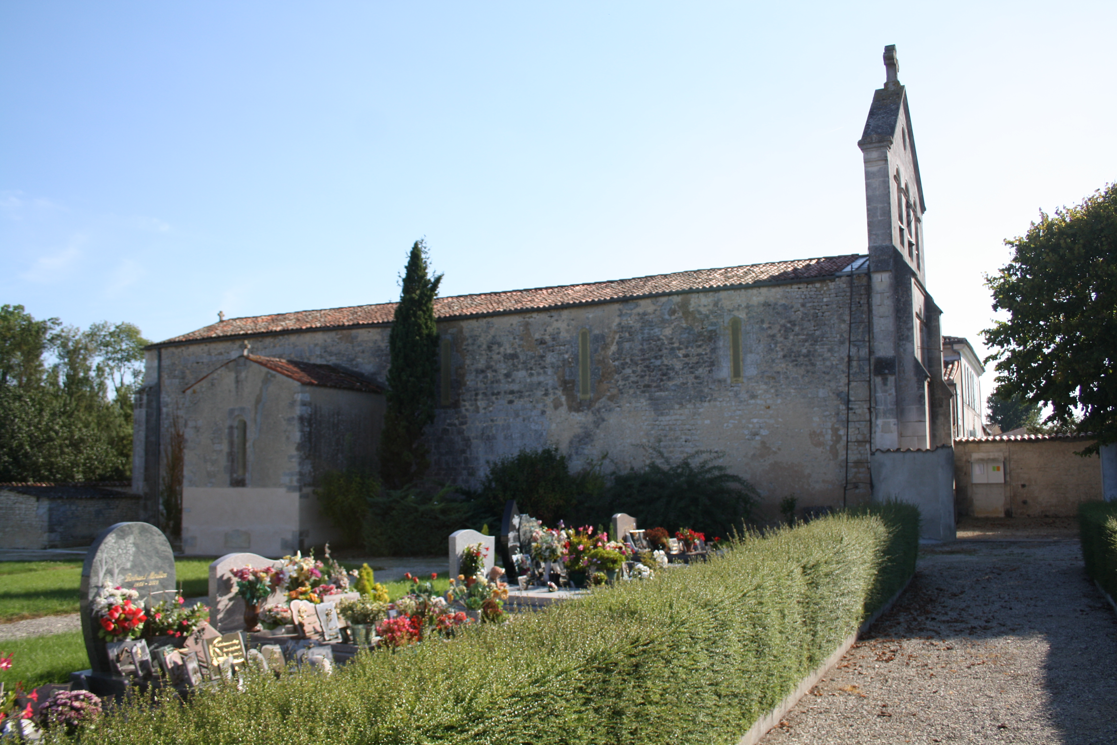 Église Saint-Nicolas de Courcelles, Charente-Maritime (France).